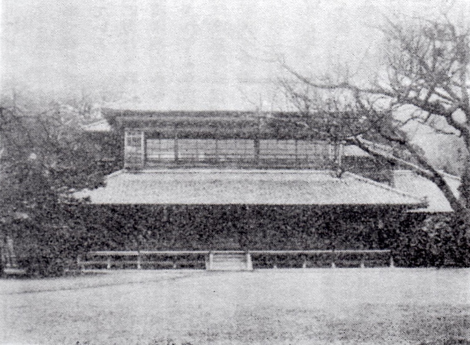 旧熱海御用邸の御殿正面。